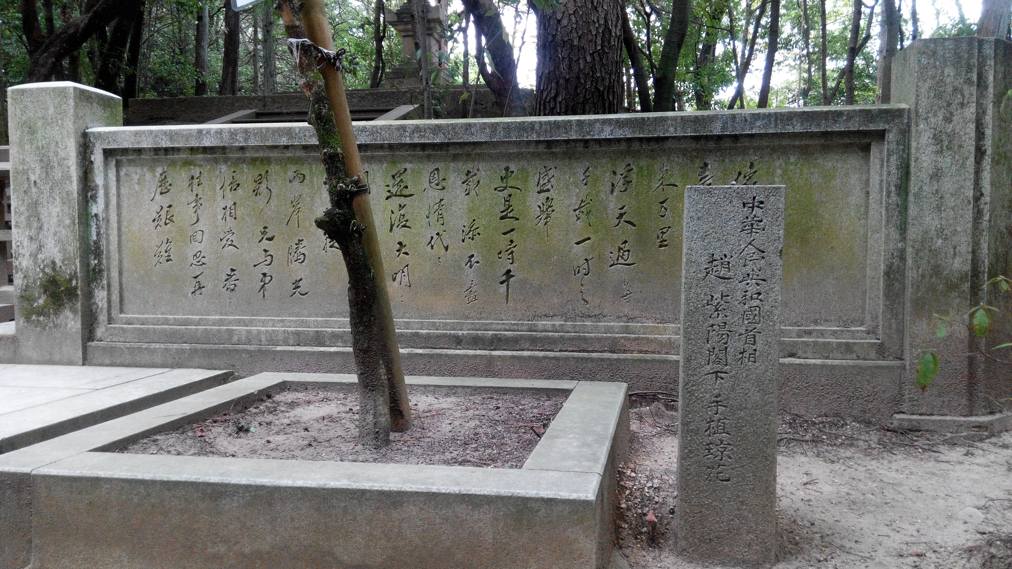 中華人民共和國總理 趙紫陽閣下手植瓊花